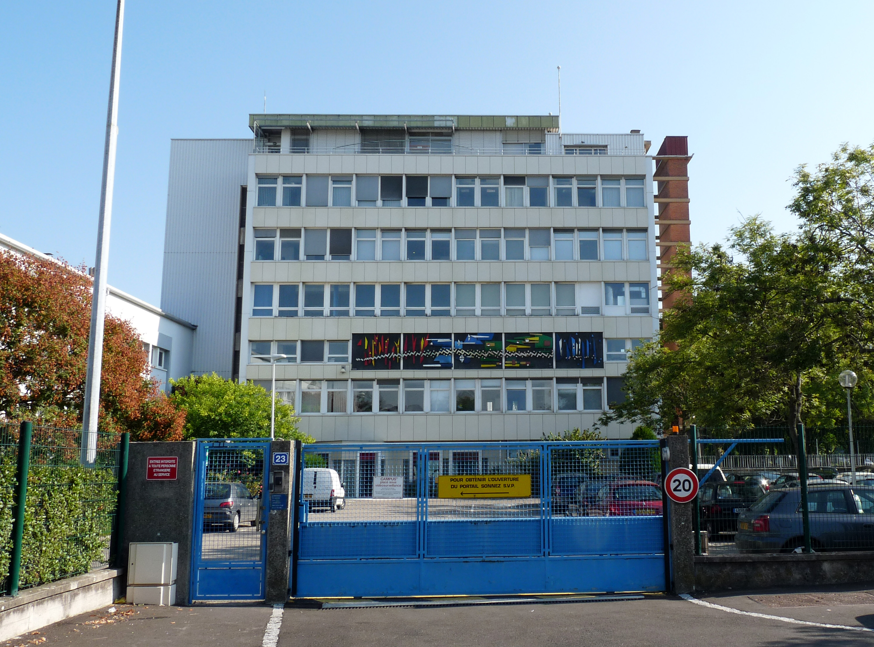 Siège de la Délégation Alsace du Centre National de la Recherche Scientifique (CNRS), 23, rue du Loess, Strasbourg-Cronenbourg